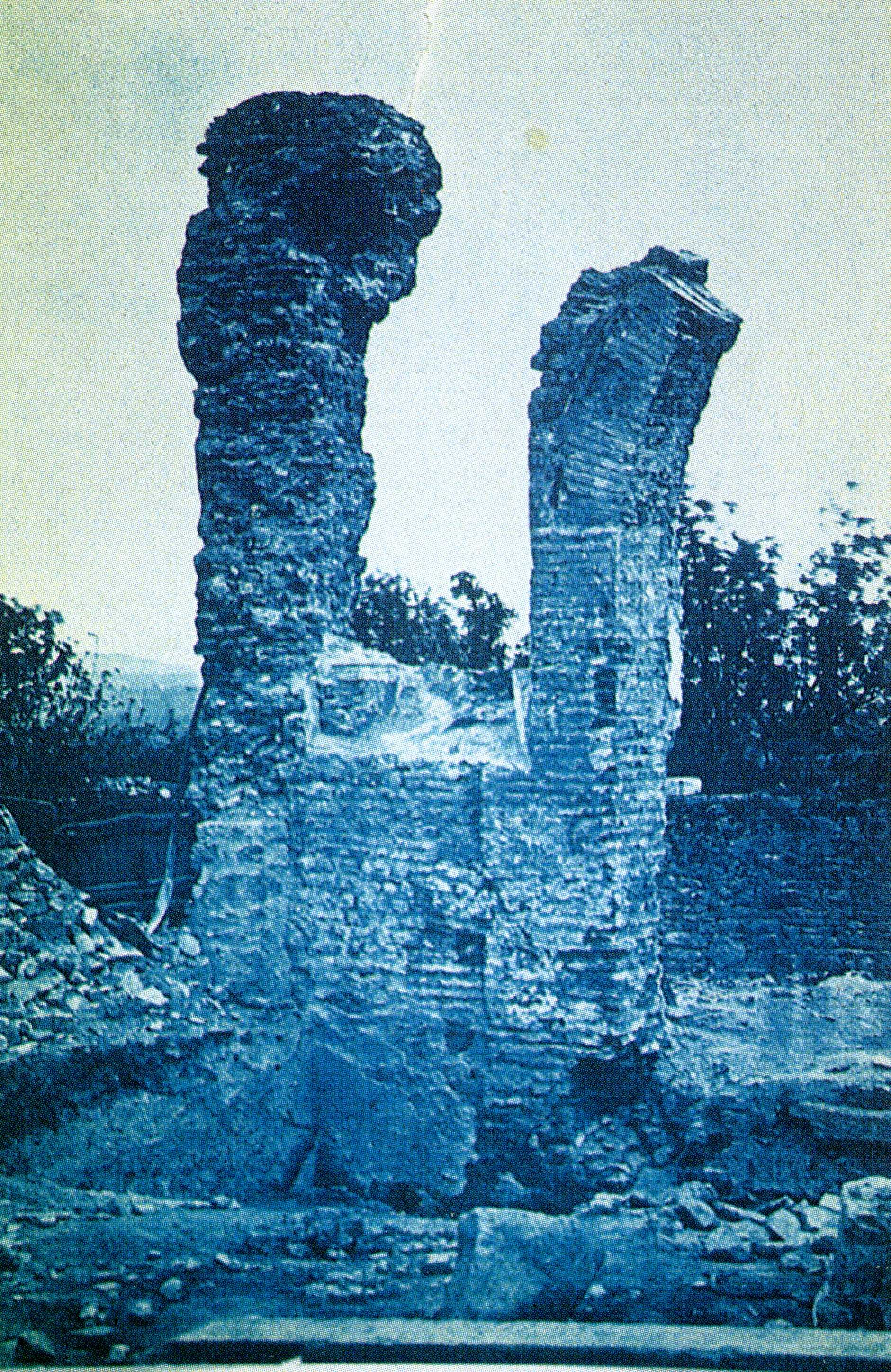 Etat des thermes de Jublains en 1877 avec une partie des murs du frigidarium en élévation (murs détruits lors de la construction de l'église actuelle)